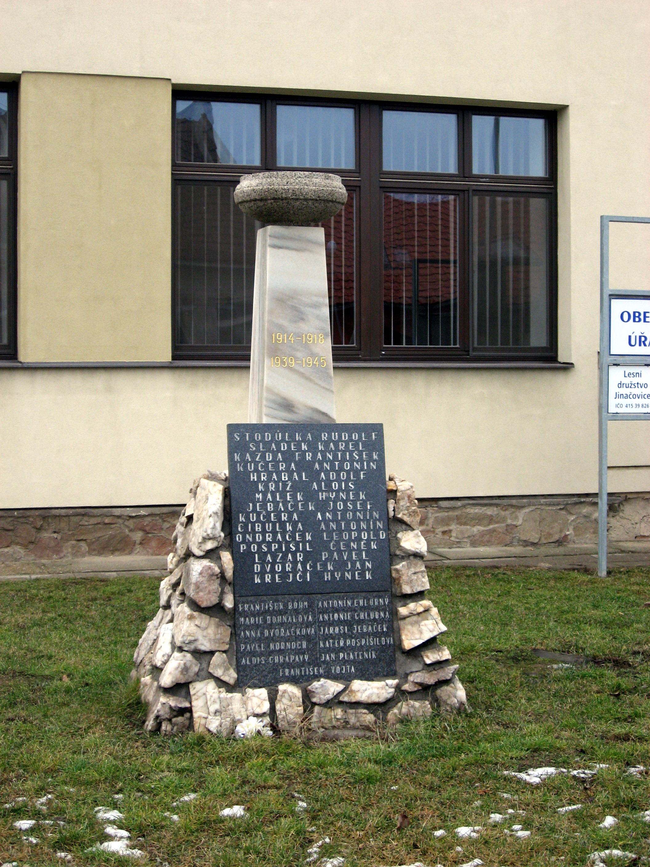 Jinačovice, památník obětem světových válek